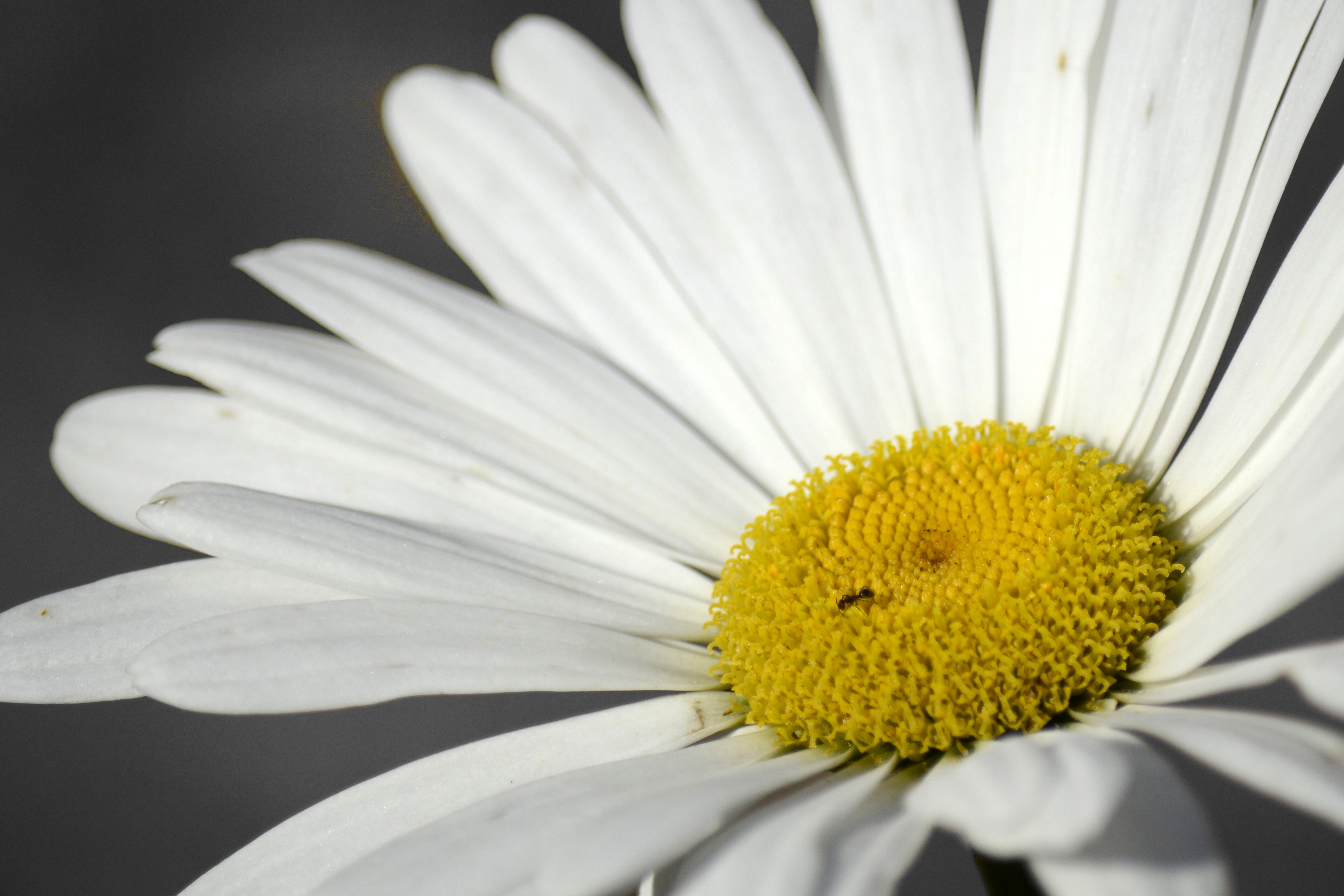 2012 - Last daisy